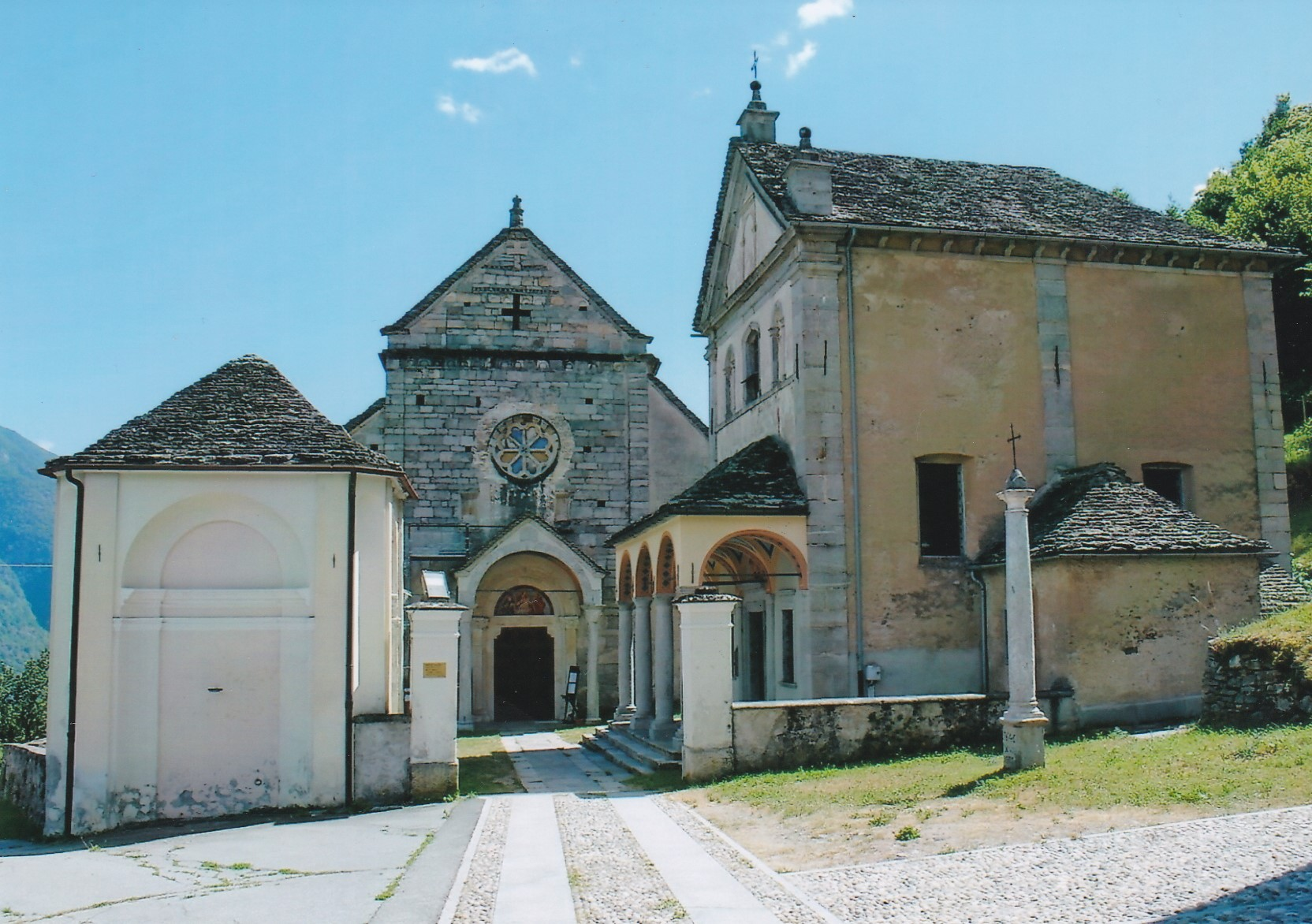 Chiesa di San Giulio di Cravegna, luglio 2018